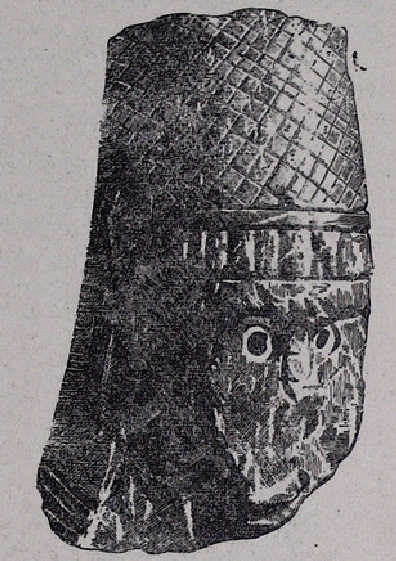 Արձանի գլուխ